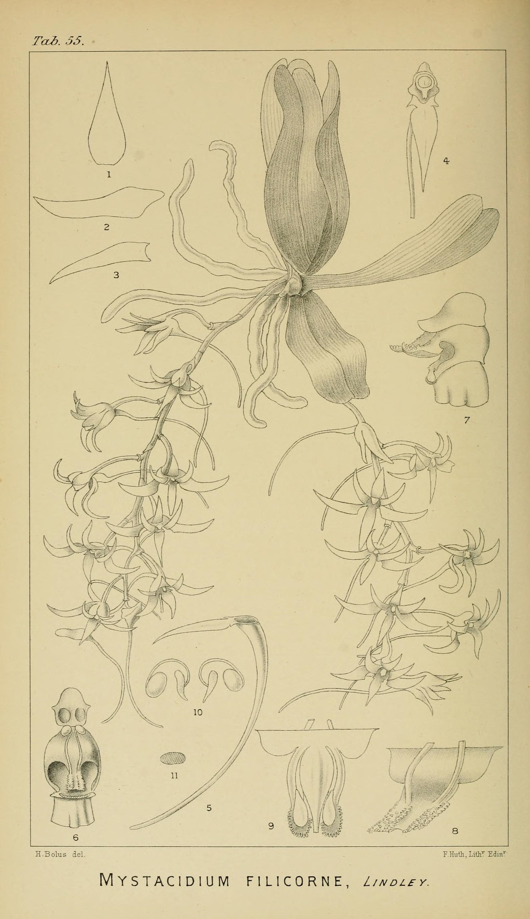 TcLb. 55. H. Bolus del MySTACIDIUM FILICORNE, Ljndlsy.